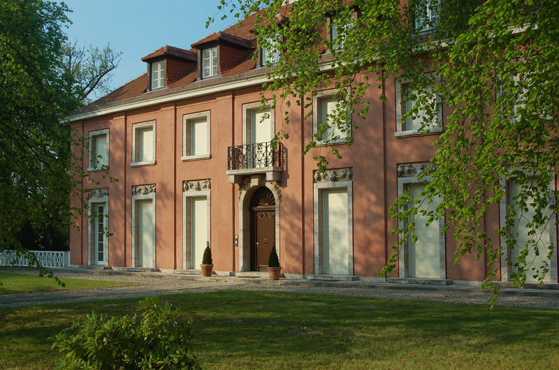 Villa Urbig ("Churchill-Villa") von Ludwig Mies van der Rohe